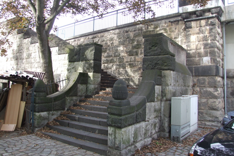 Elbbrücke in Schönebeck 2006: Fragment der Ursprungsbrücke Fotograf: Harald Rossa Datum: 3. Oktober 2006 Höher aufgelöste Version ist verfügbar